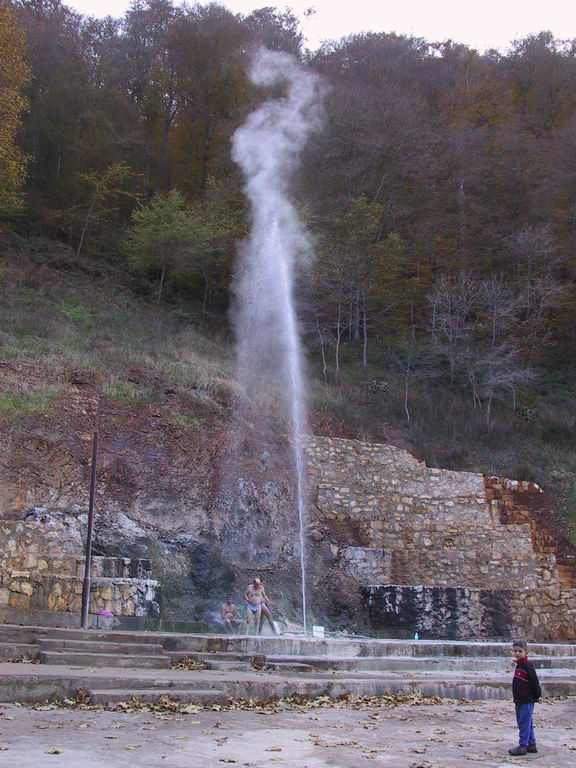 Srpski (latinica): Termomineralni vodoskok Gejzer u sklopu Sijarinske Banje